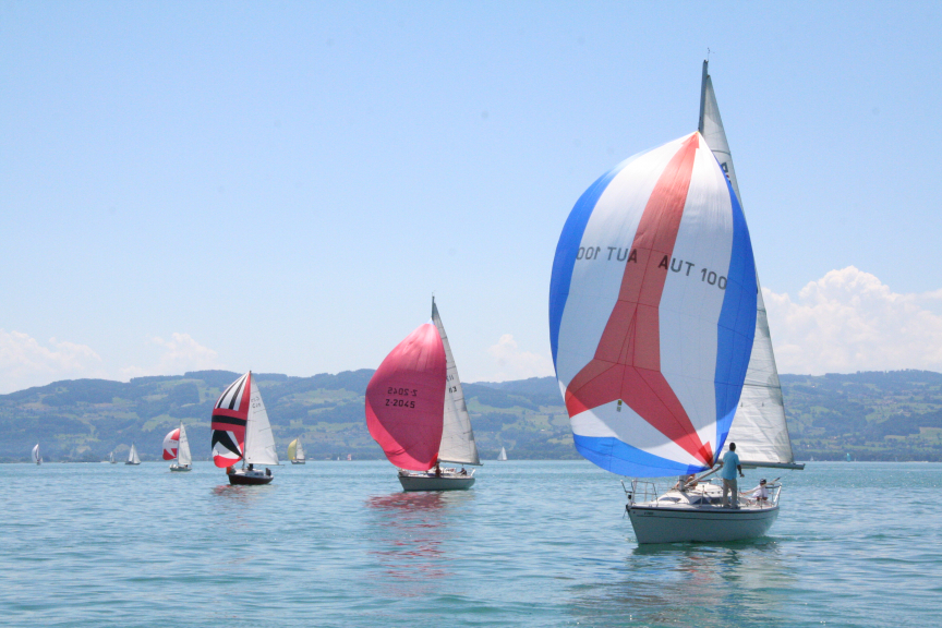 Segelboote auf dem Bodensee bei Lindau